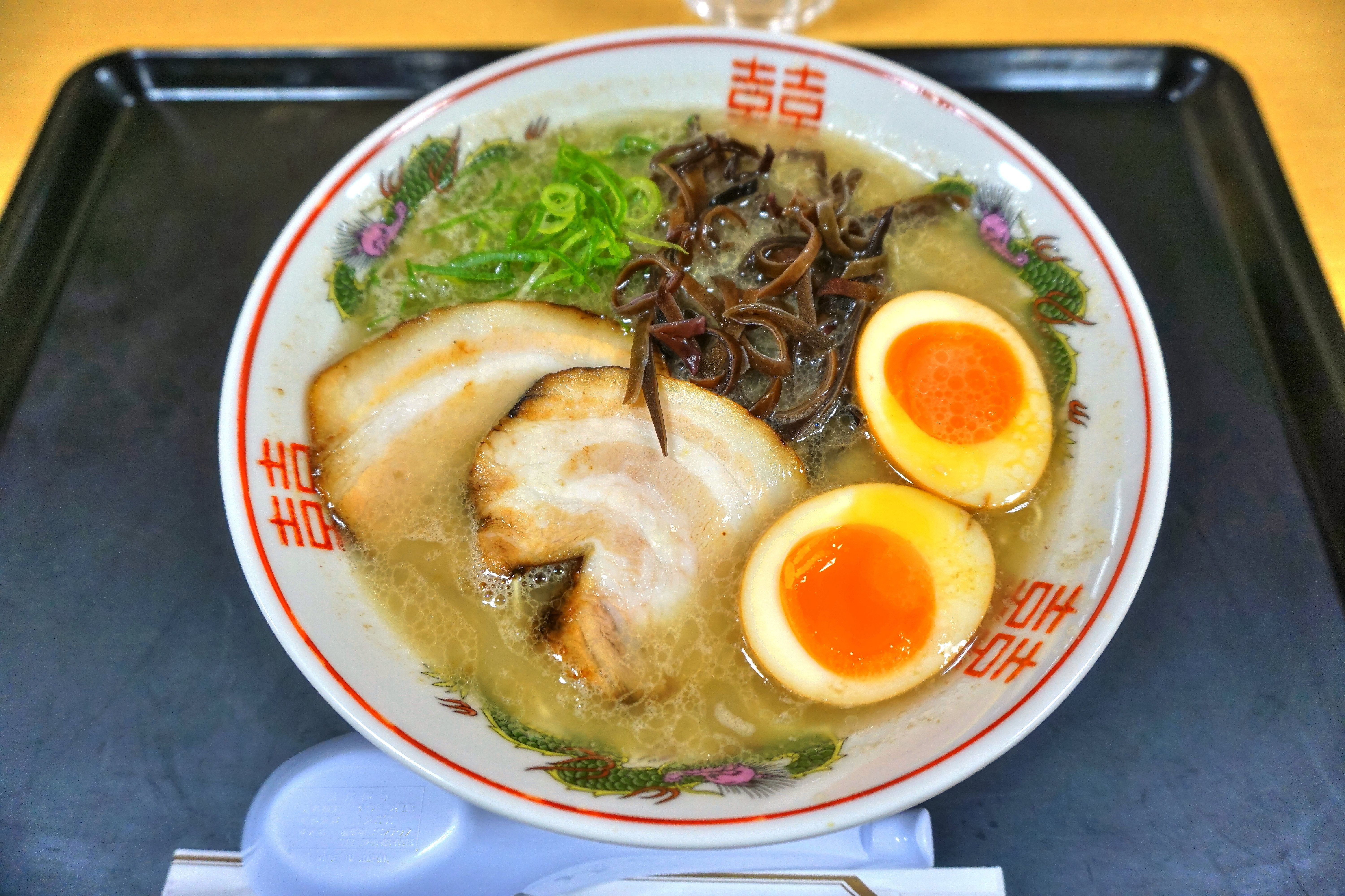 福岡県福岡市中央区、博多だるま、煮玉子ラーメン、東武百貨店船橋店購入、ラーメン